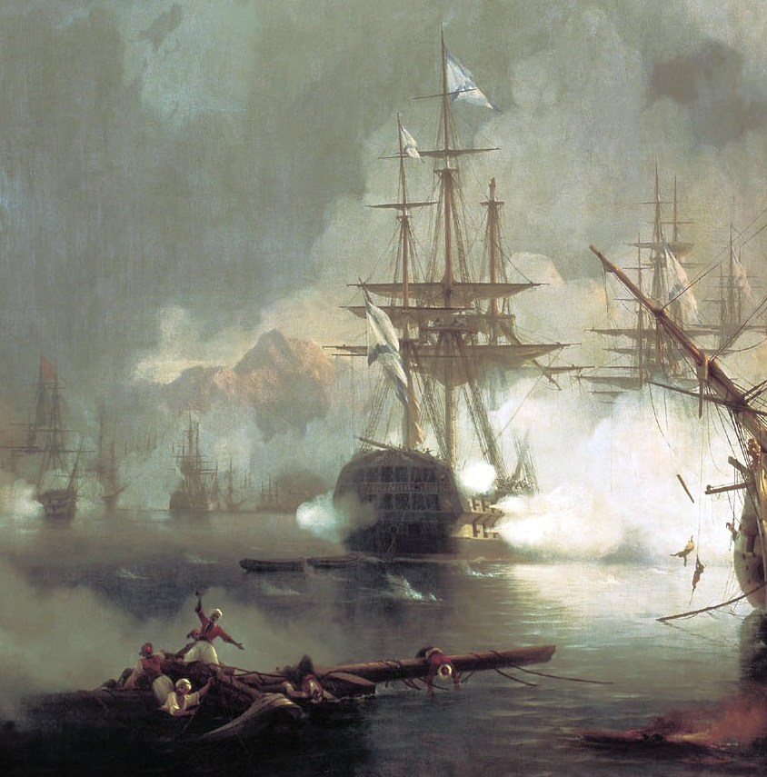 Фрагмент картины Айвазовского "Сражение при Наварине"